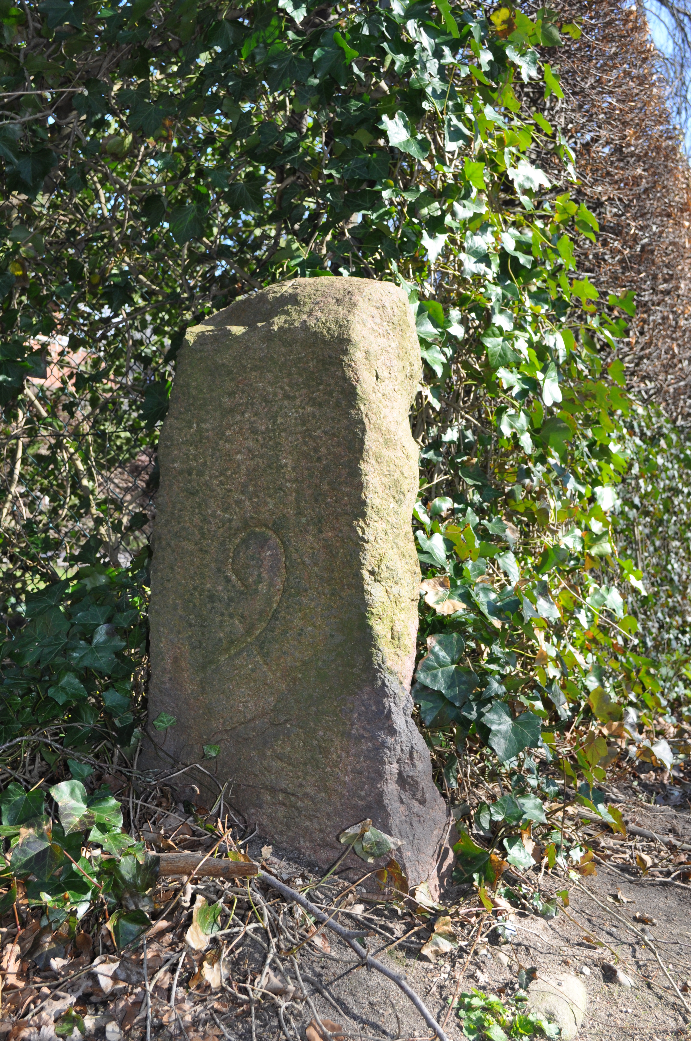 Grenzstein am Meiendorfer Weg 70 in Hamburg-Rahlstedt an der Grenze der ehemaligen Hamburg Exklave Volksdorf. This is a photograph of an architectural monument.